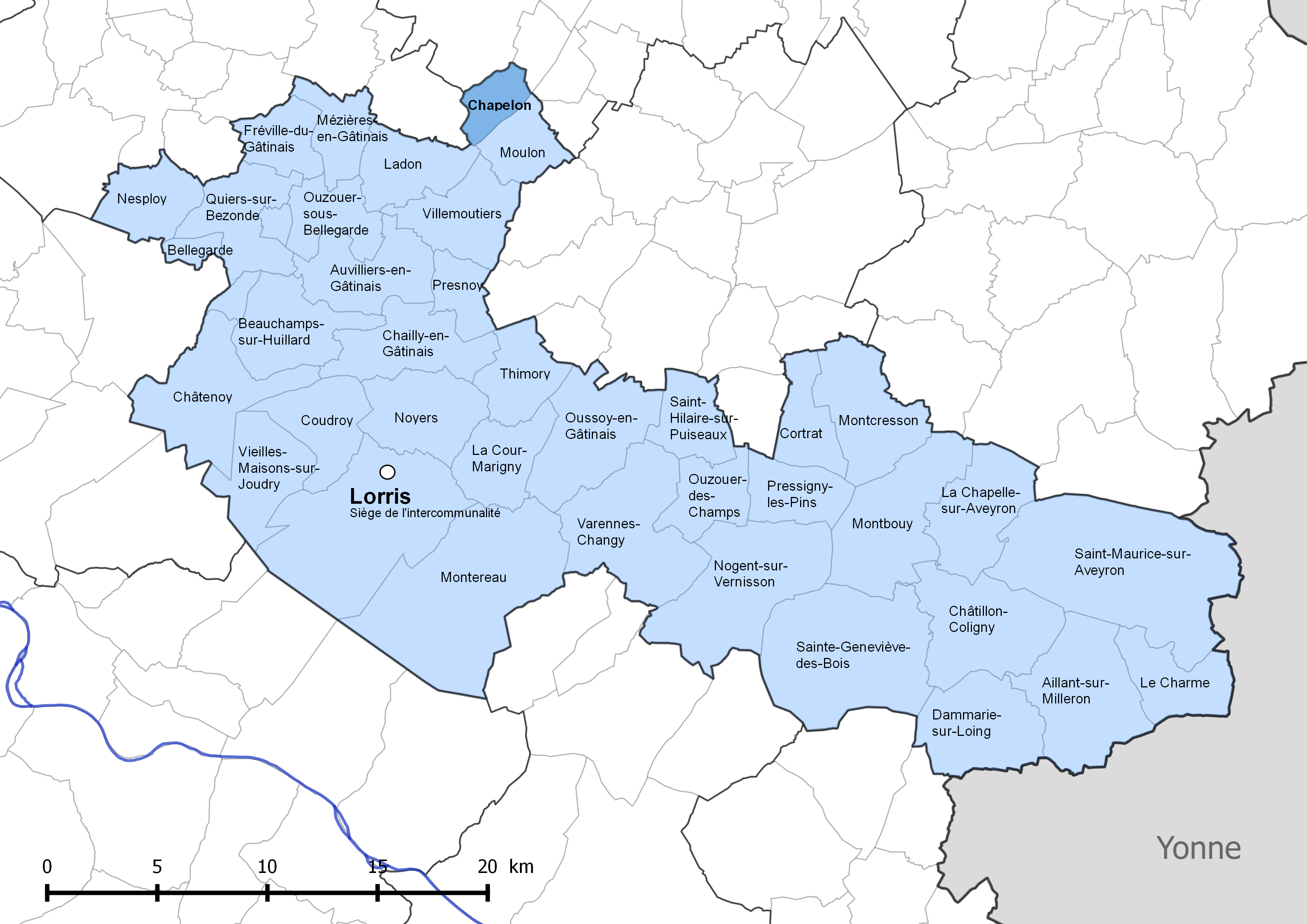 Périmètre de la communauté de communes Canaux et forêts en Gâtinais - Situation de la commune de Chapelon.